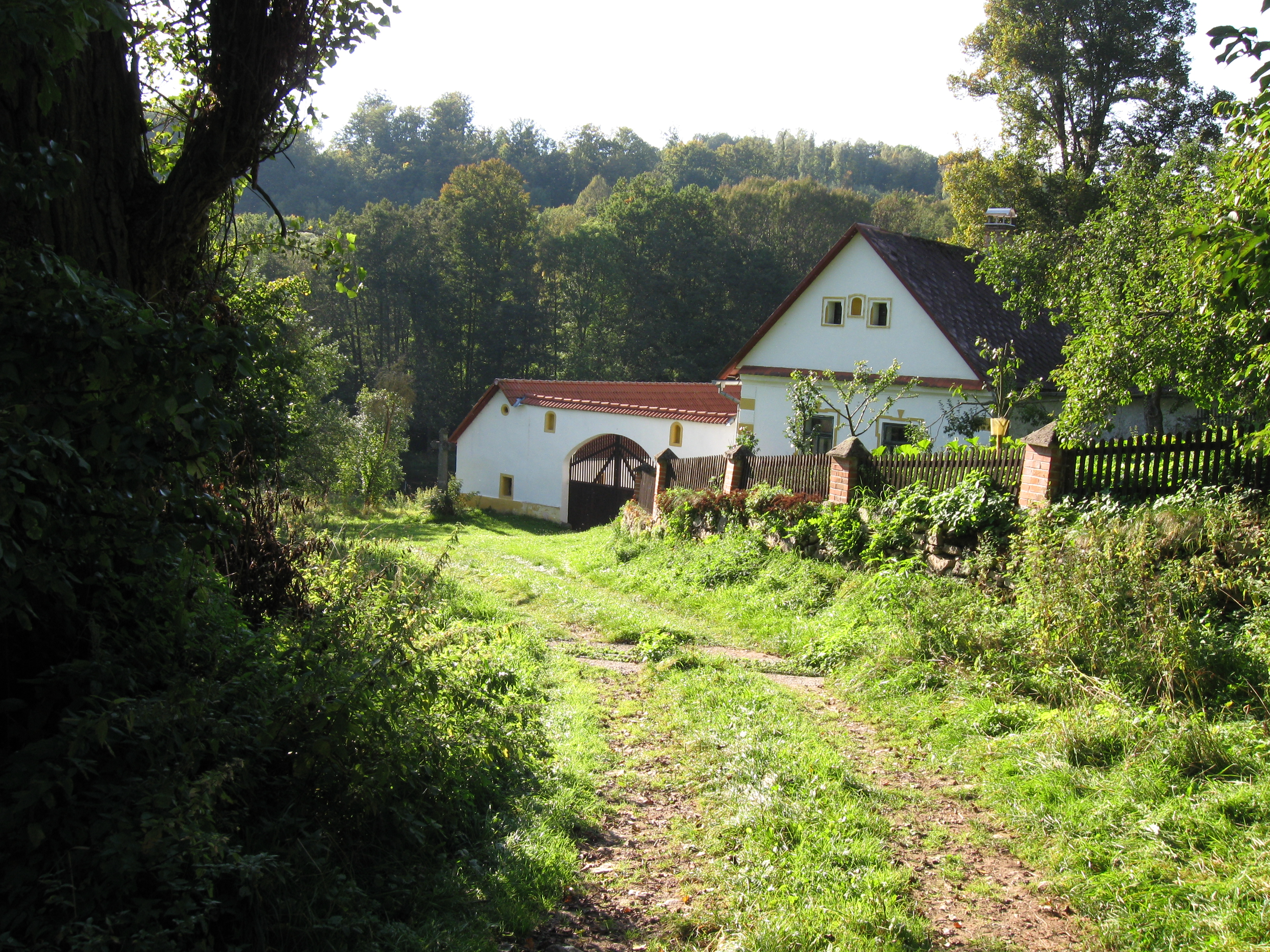 Usedlost v obci. Číčovice je část obce Nadějkov v okrese Tábor. Česká republika.